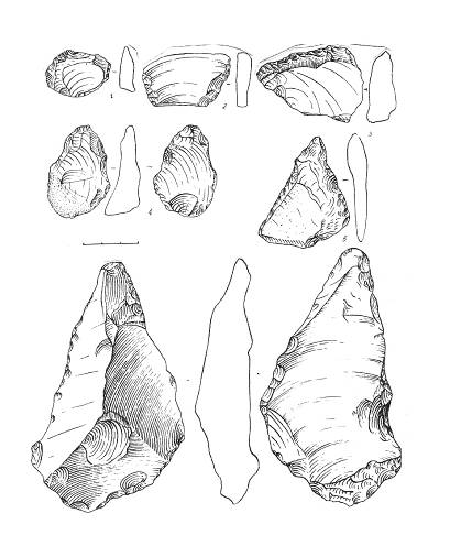 Üst Paleolit dövrünün əmək alətləri